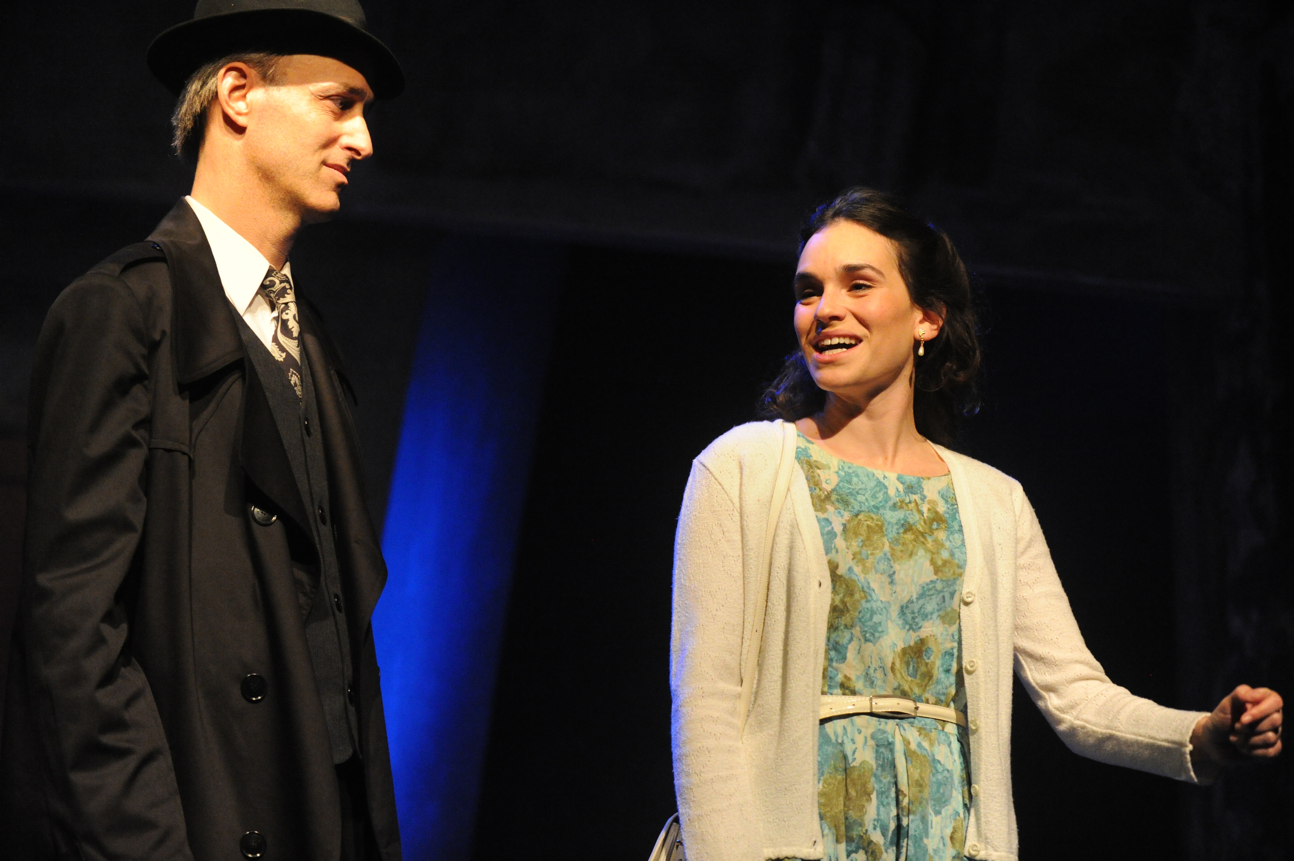 תמר אלקן וניר רון בהצגה"חוקר פרטי", מאת ובבימויו של מיקי גורביץ', תיאטרון החאן, 2011